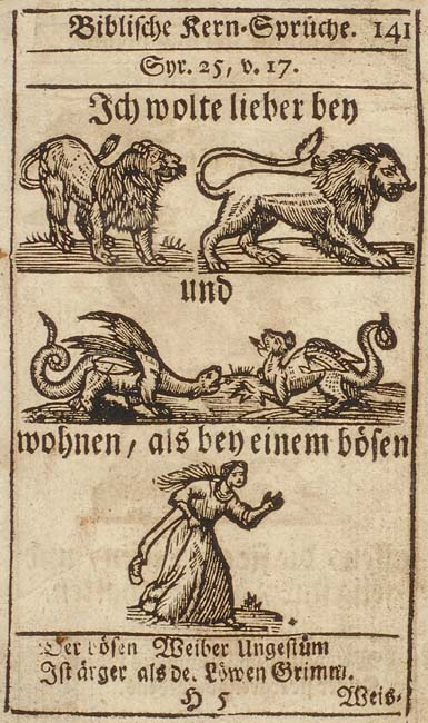 Illustration des Bibelspruchs aus Jesus Sirach 25, 17. Ich wolte lieber bey Löwen und Drachen wohnen, als bey einem bösen Weib. Woodcut, 12.3 x 7.0 cm